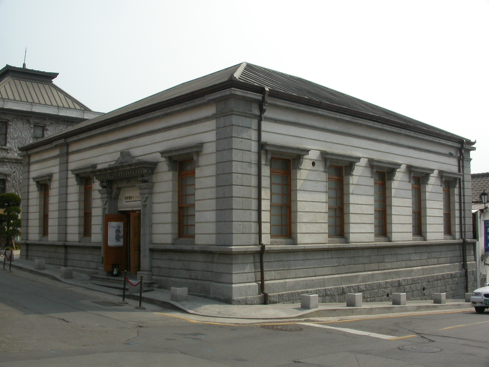 구 인천 일본 18은행 지점